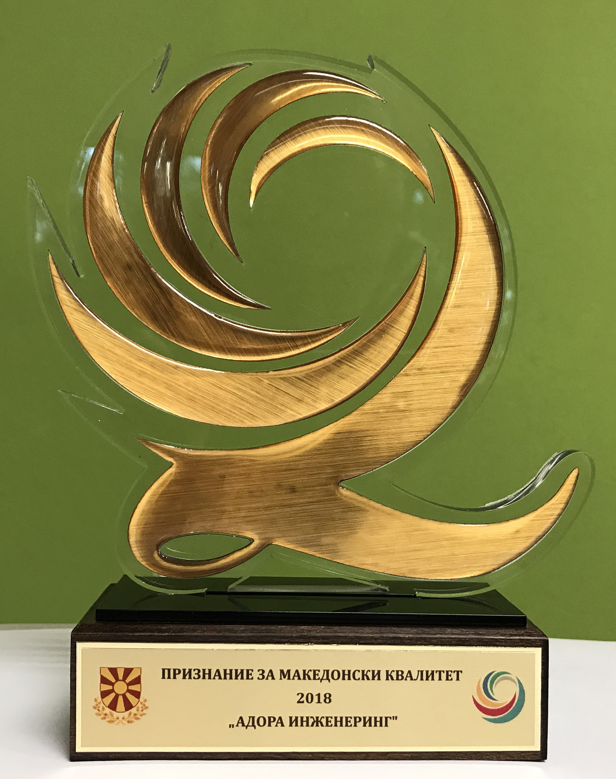 Nagrada Adora Makedonski kvalitet